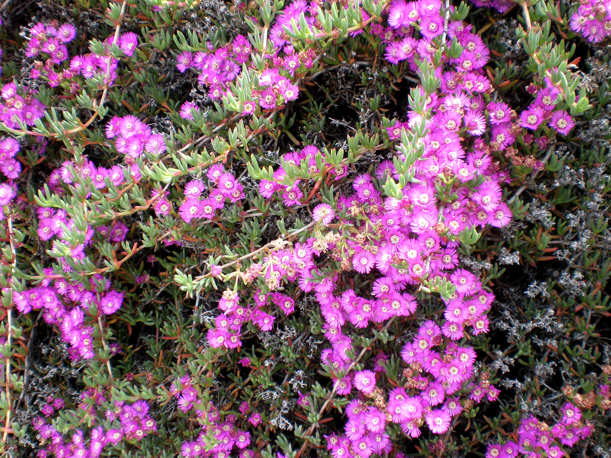 Jardín Botánico de Barcelona.